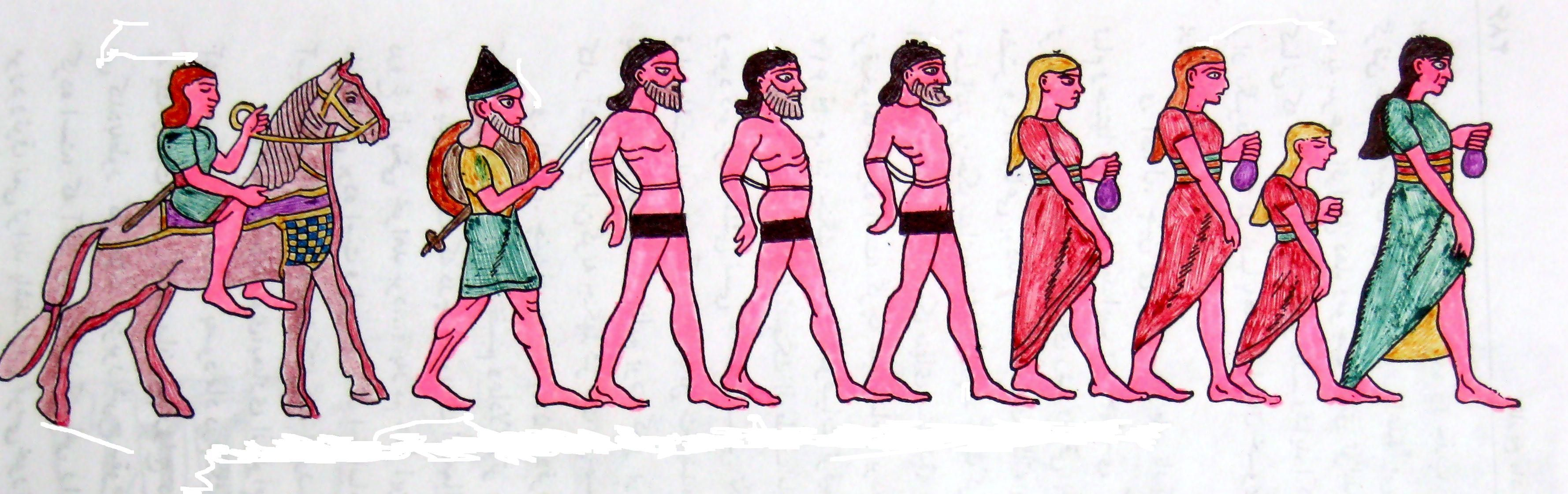 انتقال مردان اسیر به قربانگاه